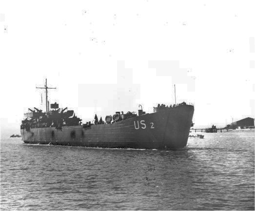 USS LST-2 em alto mar entre os meses de janeiro e junho de 1944